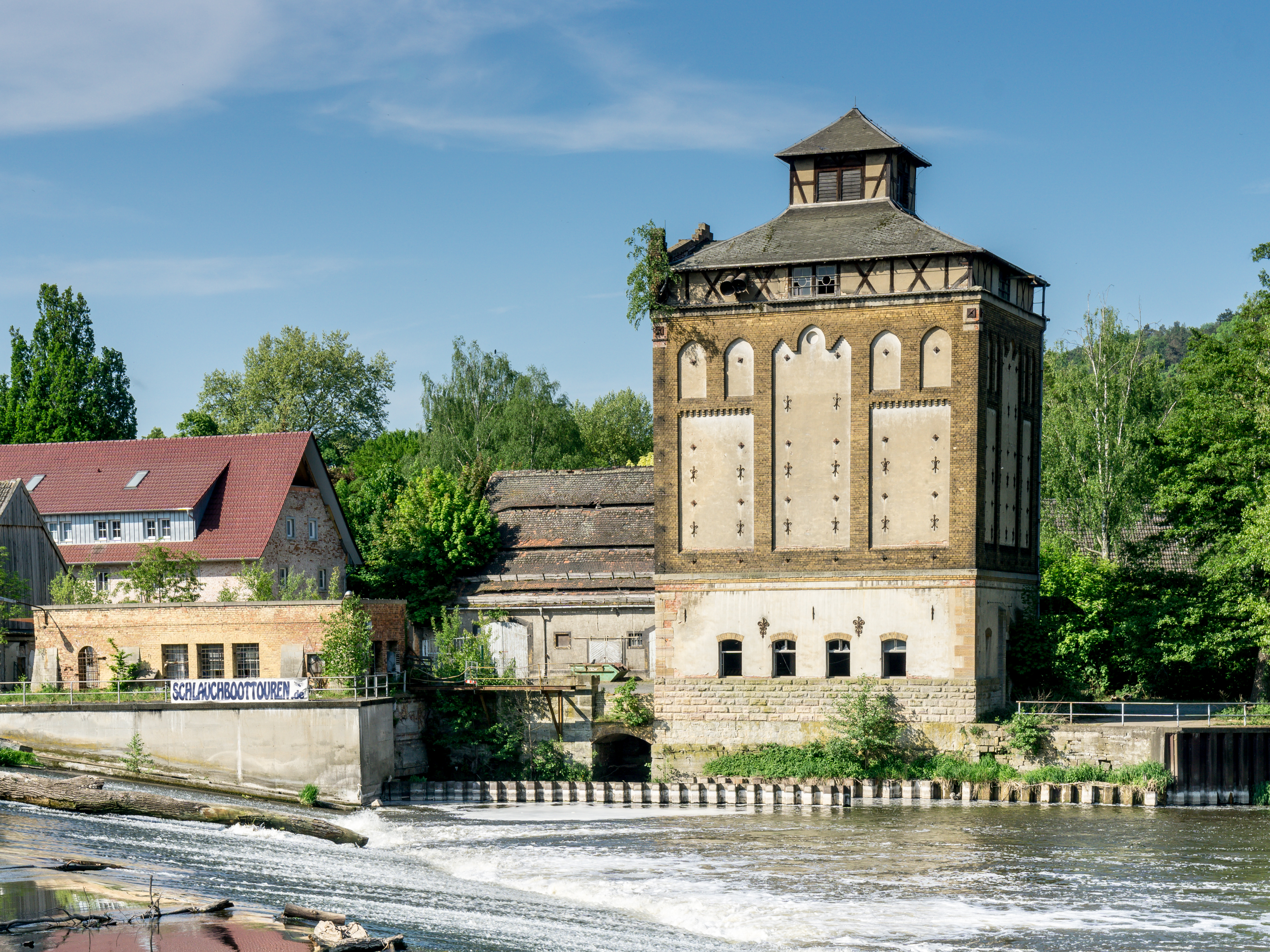 Alte Mühle, An der Brücke 1 in Naumburg OT Bad Kösen